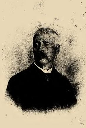 Димитър Цанко (1814 - 1904), български просветен деец от Бобощица.